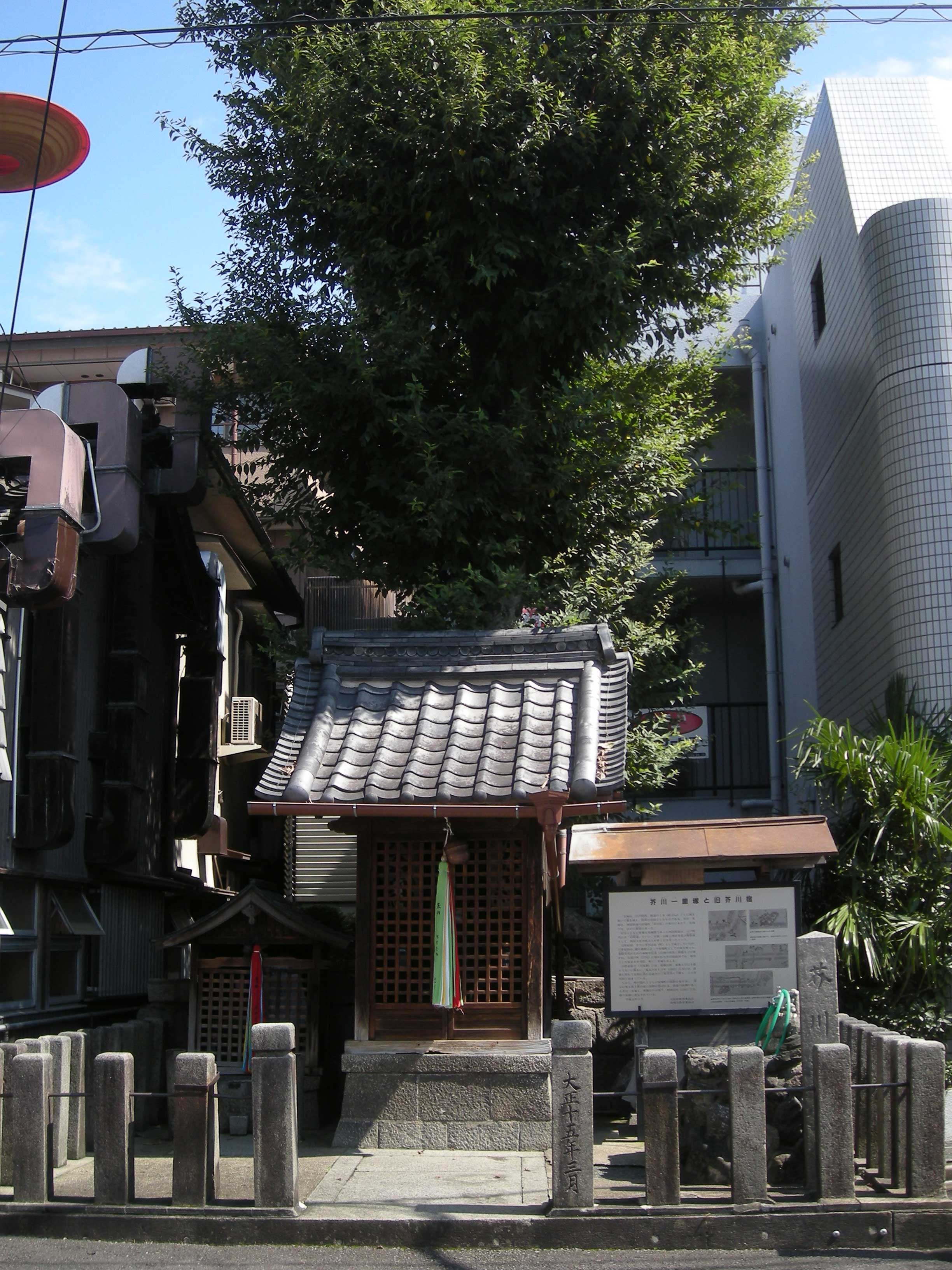 西国街道芥川一里塚